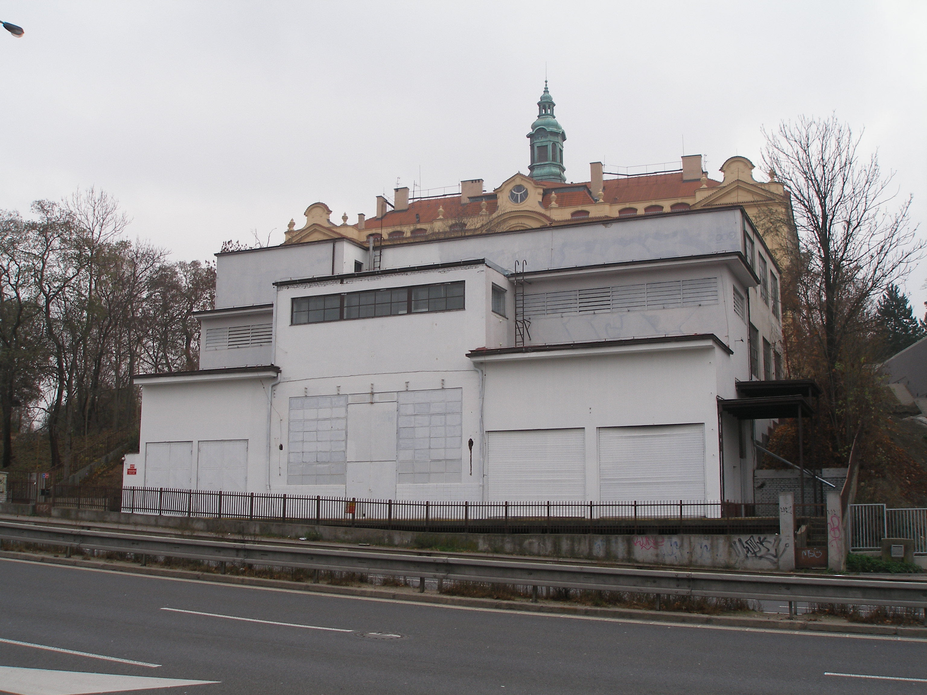 Budova vychovatelny v areálu nemocnice na Bulovce spolu s bývalou tramvajovou měnírnou.